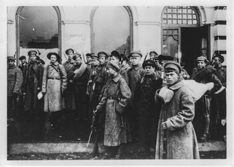 War communism - A Bolshevik requisitioning brigade